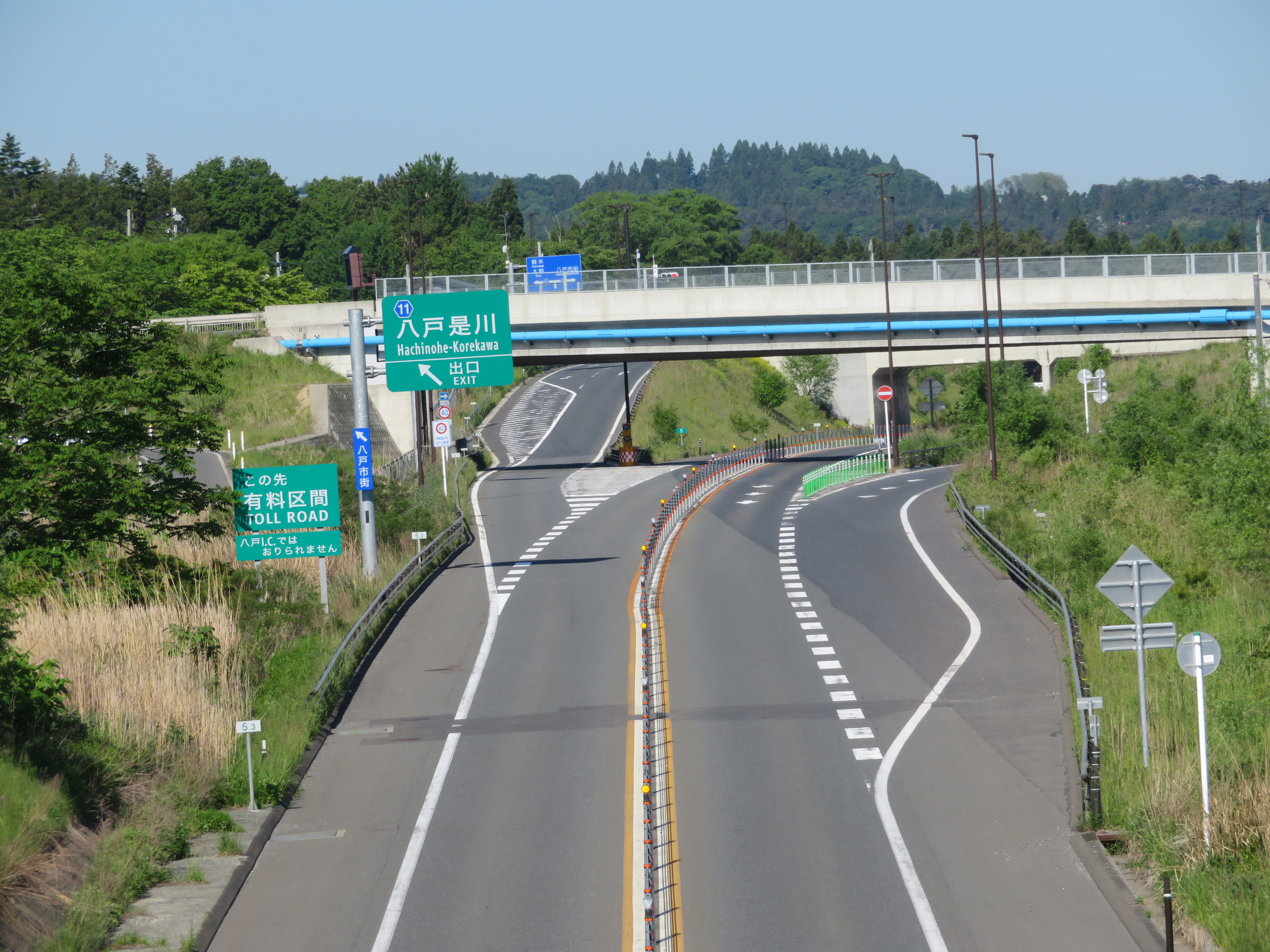 八戸久慈自動車道 八戸是川ＩＣ（久慈方面側を撮影） Canon PowerShot SX720 HS